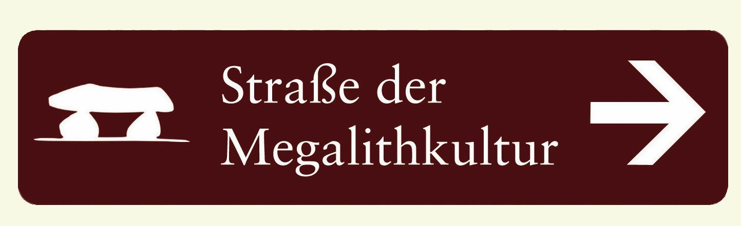 Hinweisschild zur "Straße der Megalithkultur"